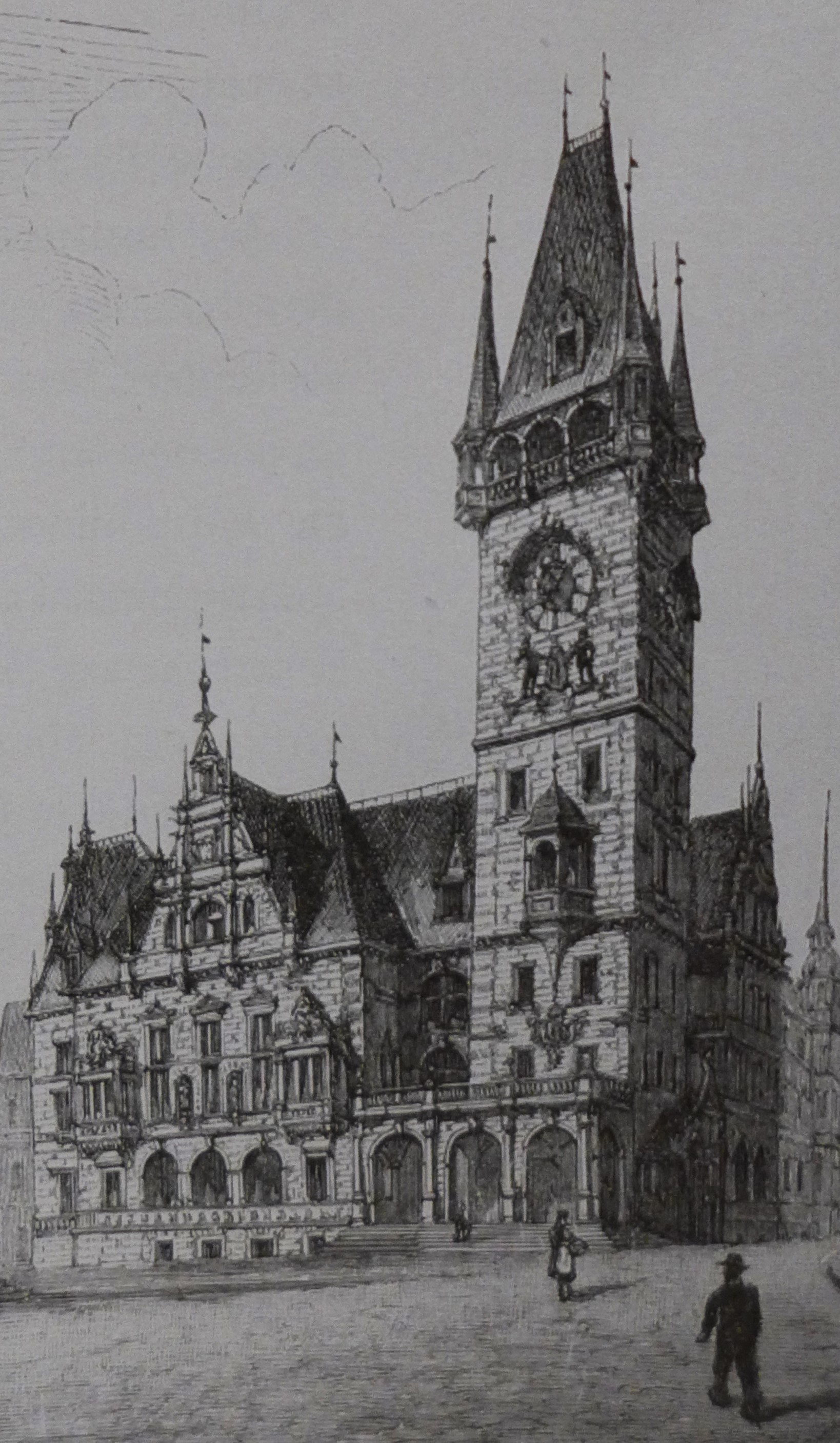 Georg von Hauberrisser: Entwurf aus dem Jahr 1886 für ein neues Rathaus in Reichenberg in Böhmen (Deutsche Bauzeitung, 1887)